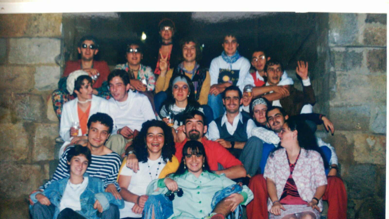 Sanmigelak. Mozorro eguna